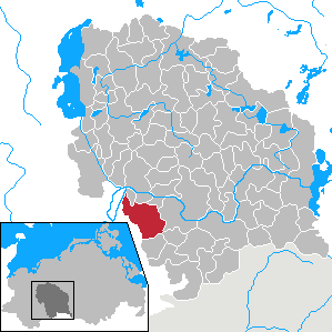 Spornitz in Mecklenburg-Vorpommern - District Parchim